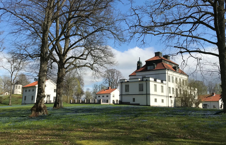 Stjärnvik Östergötland